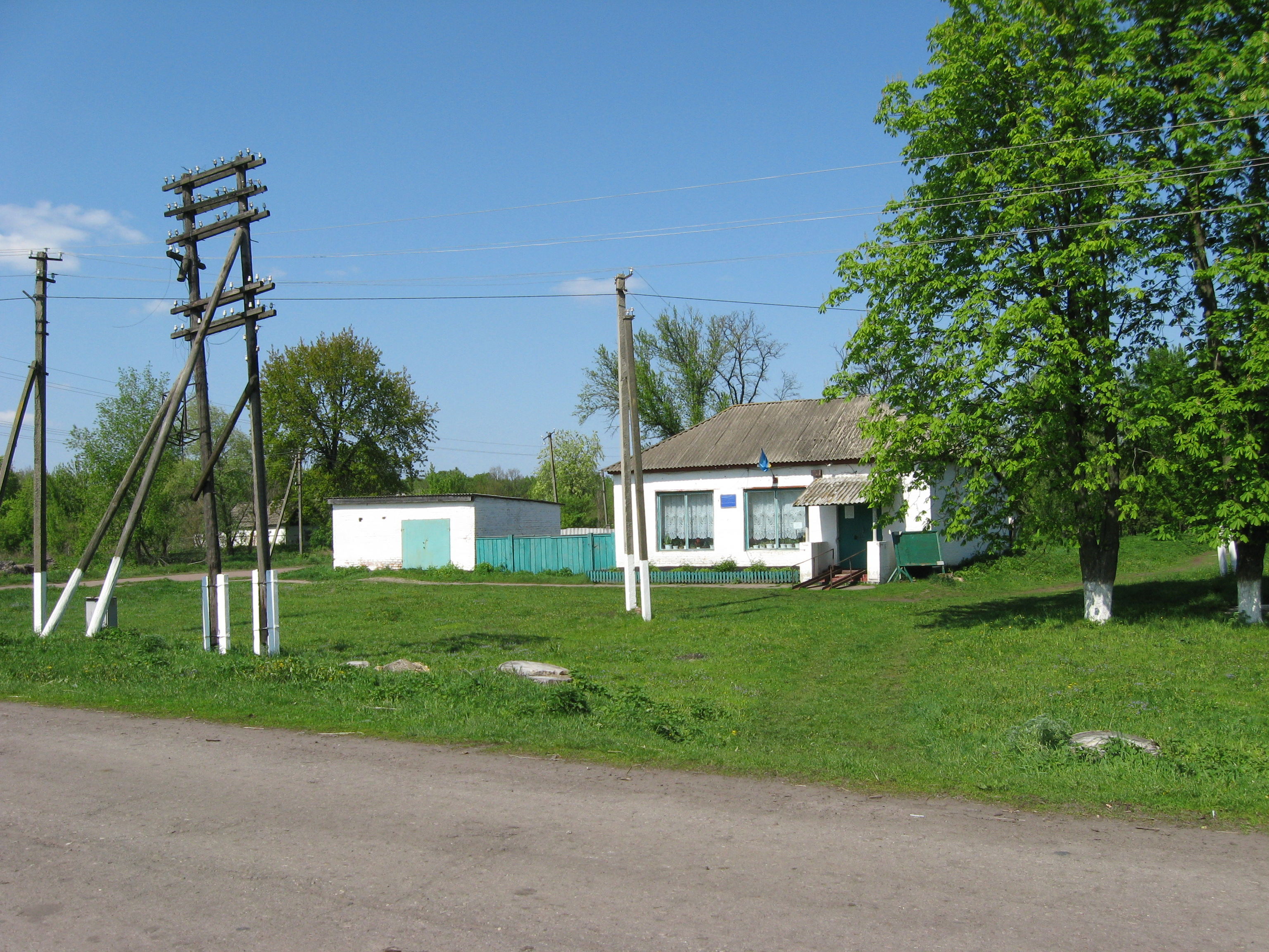 Будинок сільради